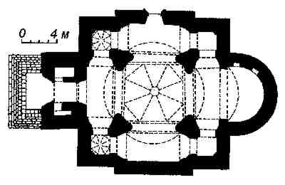 Поземна проекція церкви святого Георгія в Кам'янці-Подільському.